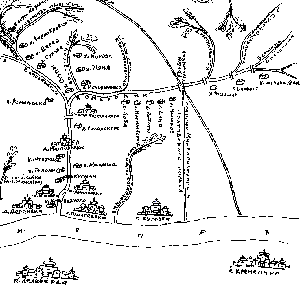 Фрагмент копії карти задніпрських володінь Келебердянської і Переволочанської сотень Полтавського полку 1752 року із зображенням населених пунтктів, що існували на той час на території сучасного Онуфріївського району Кіровоградської області Україна